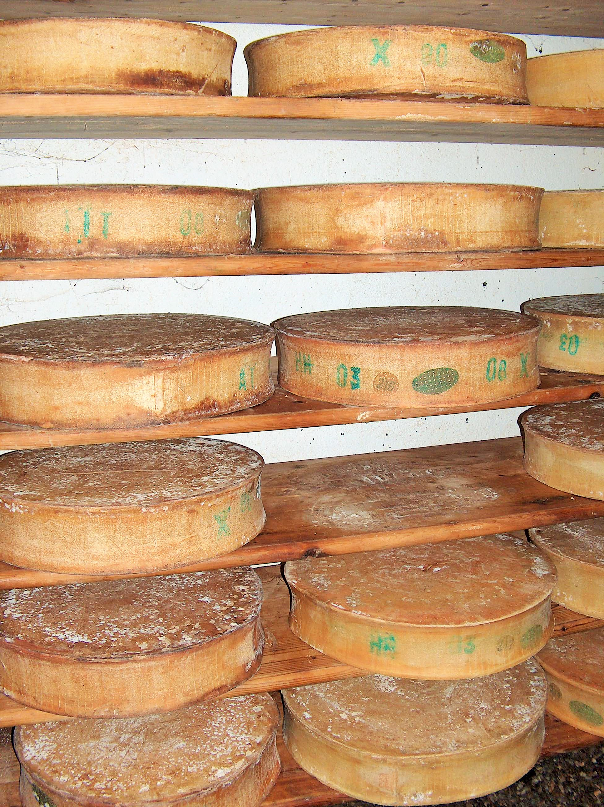 Beaufort dans la cave de la coopérative laitière de Moûtiers